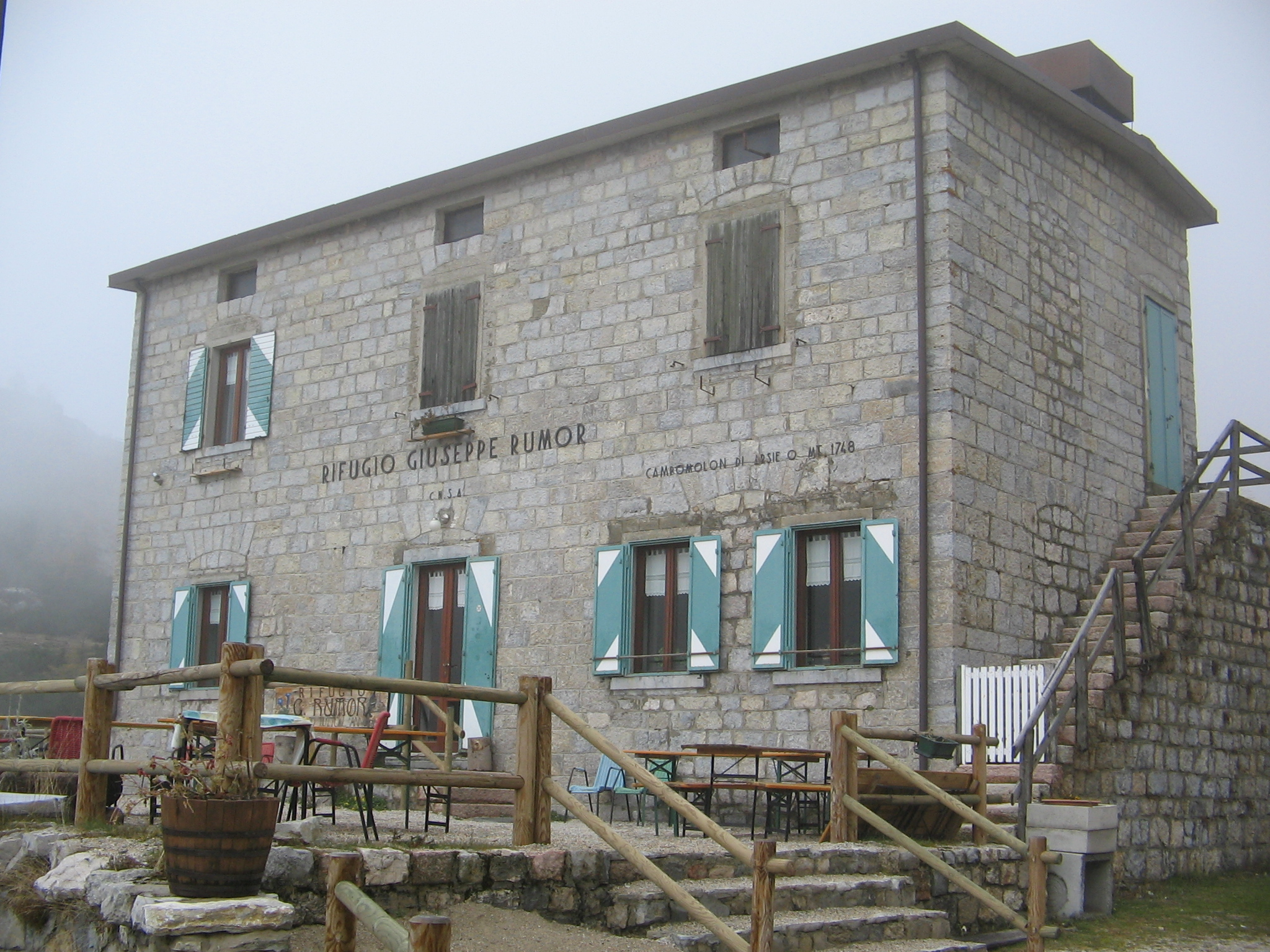 rifugio Rumor